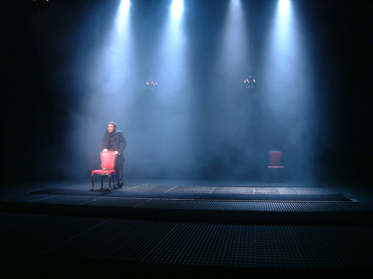 הפקת השודדים בתיאטרון ראדא, לונדון, 2003. בבימויו של גדי רול תפאורה - דאגלס היפ, תאורה - ג'ונתן סמיואלס. The Robbers production by Friedrich Schiller in RADA theater, 2003: director: Gadi Roll, designer: Douglas Heap, lightning: Jonathan Samuels.